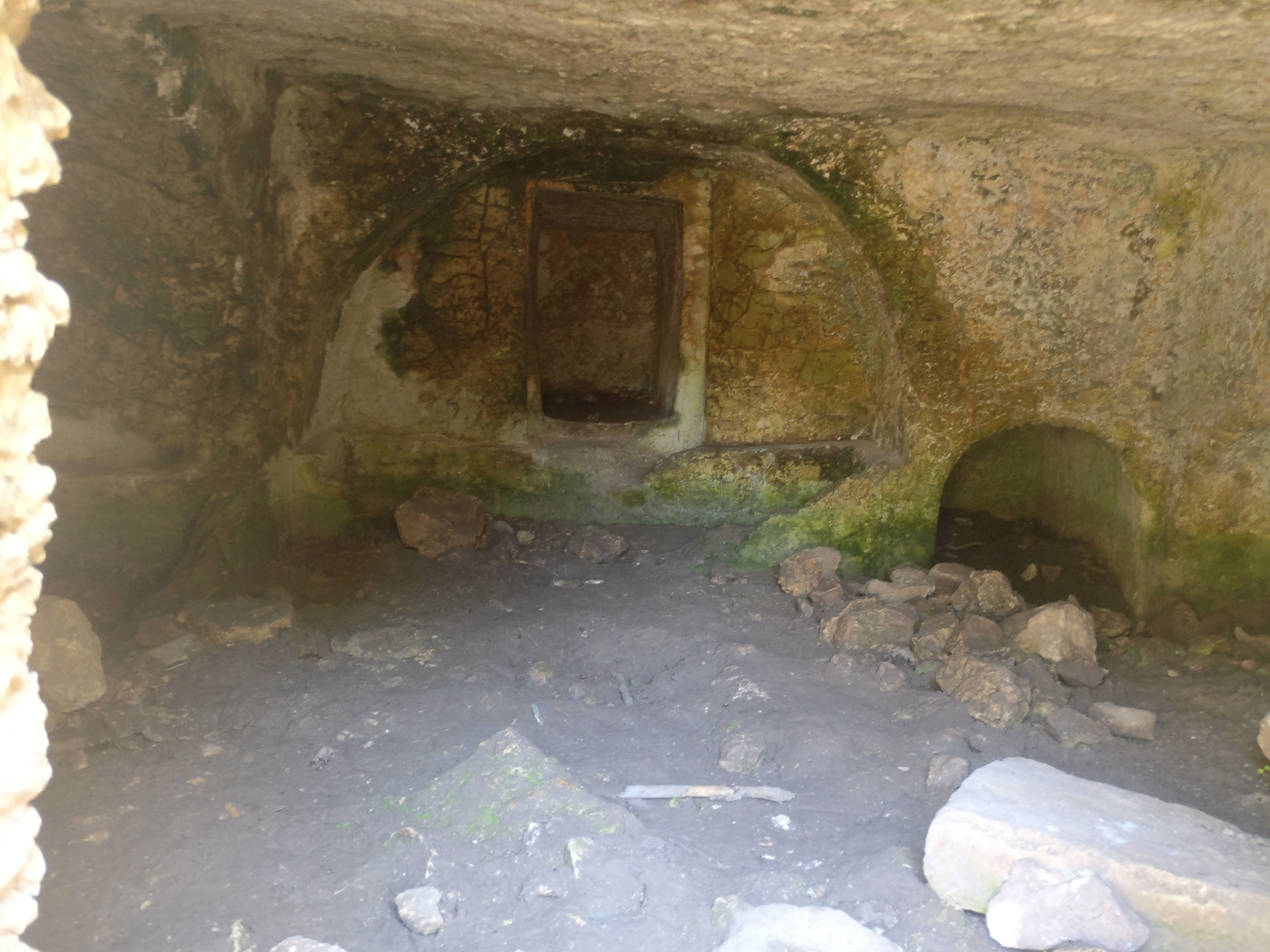 פנים מערת רקית שבכרמל